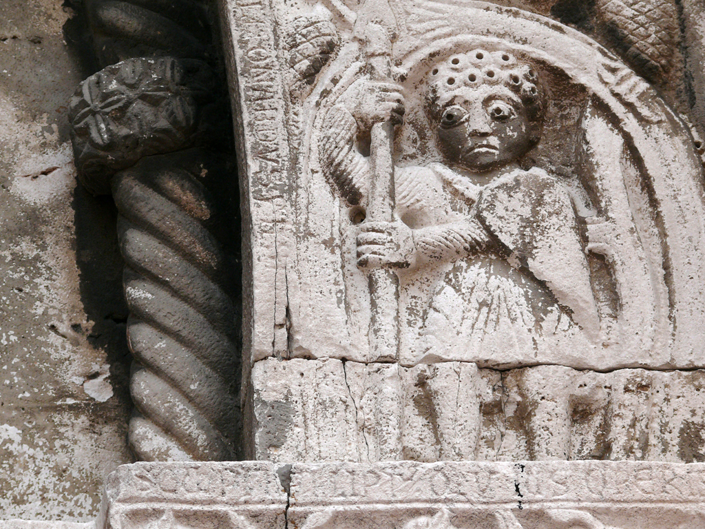 Ancona: Santa Maria della Piazza, facade - detail